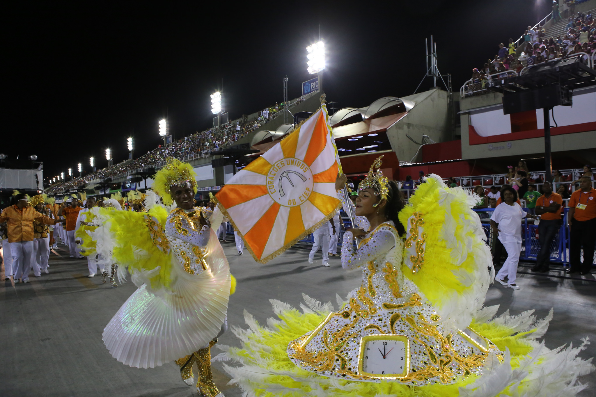 Rio de Janeiro - Pequenos sambistas fecham desfiles na Marquês de Sapucaí.